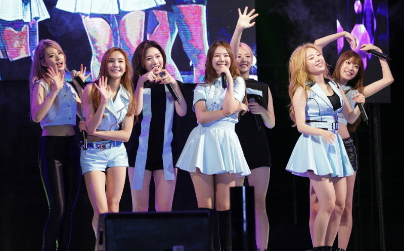 소나무 한마음 위문공연 CBS 러빙유 콘서트 양평 개군 레포츠 공원